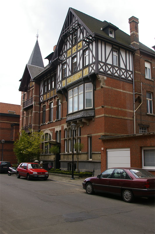 Transvaalstraat 13-17, Zurenborg area of Antwerp ,arch. Frans Van Dijk.